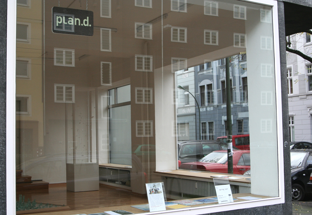 Galerie plan.d. in Düsseldorf, Außenansicht.